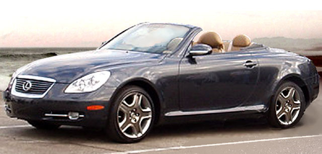 Lexus SC de segunda generación.